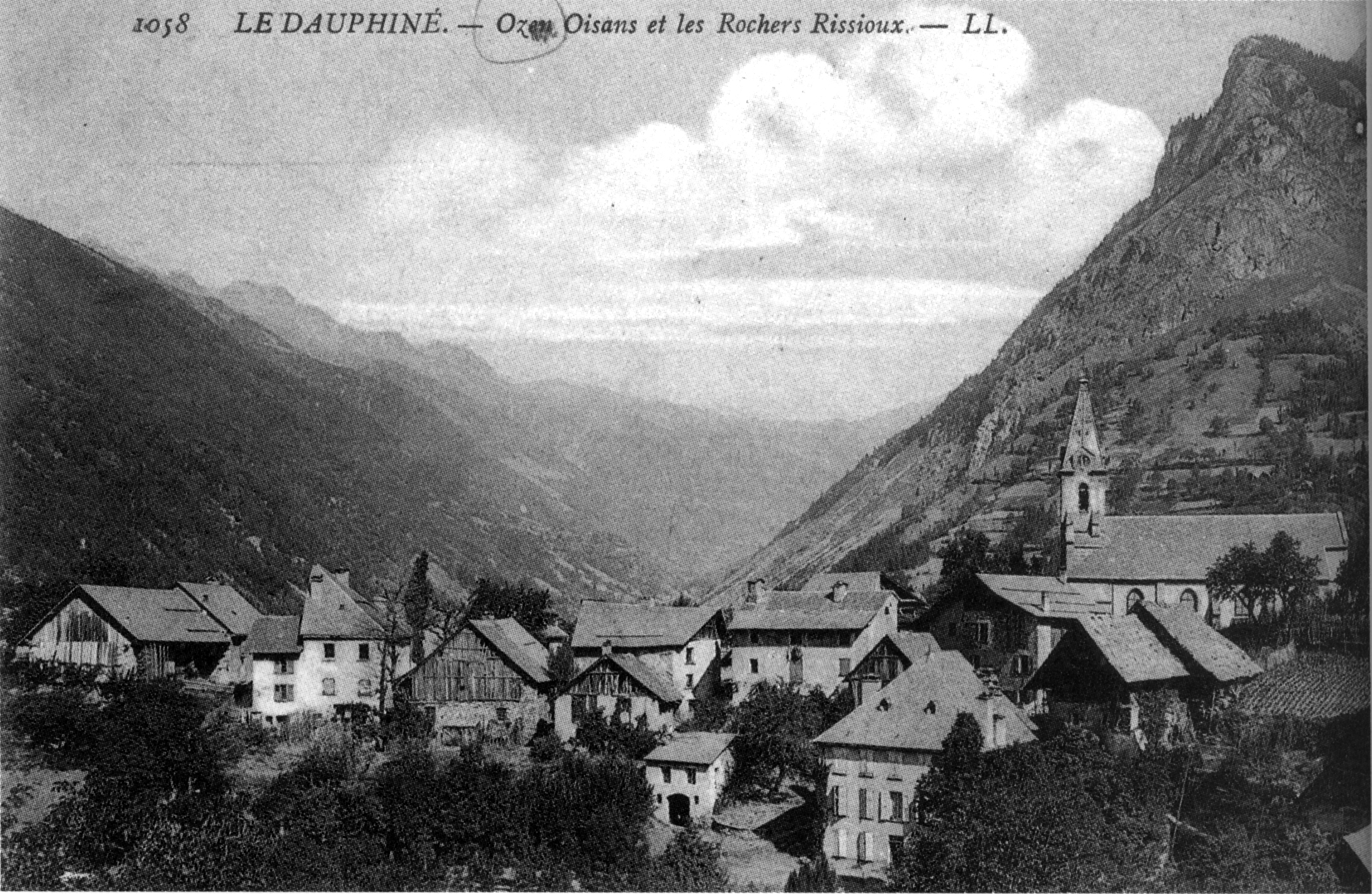 Oz-en-Oisans et les Rochers Rissioux en 1912